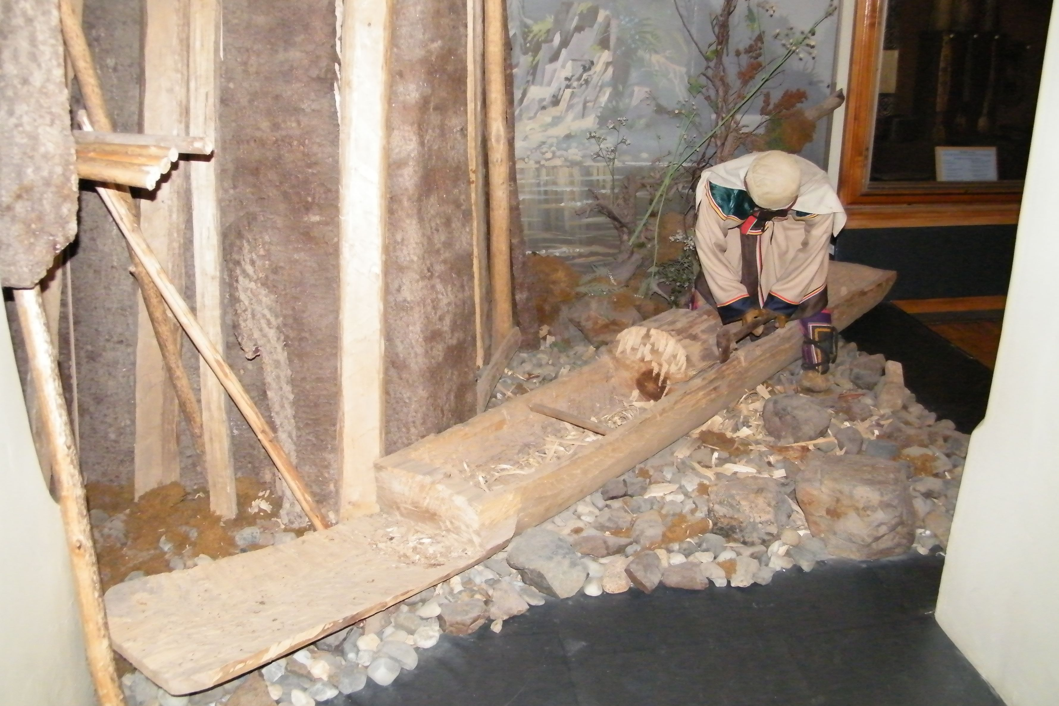 Удэгеец строит бат